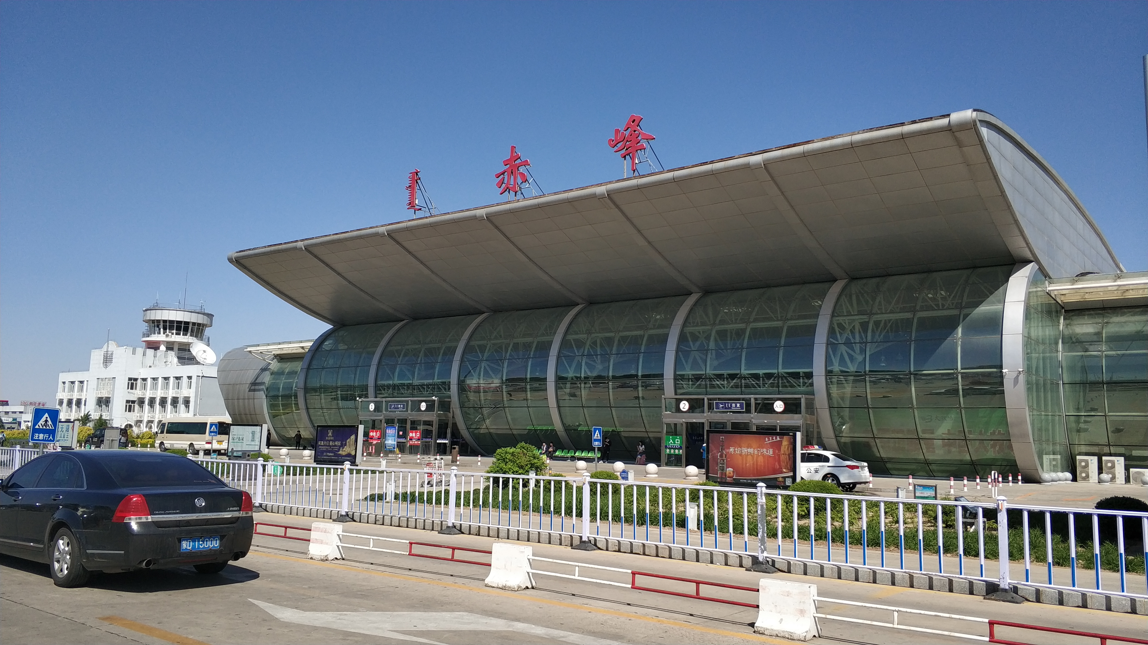 赤峰玉龙机场外景